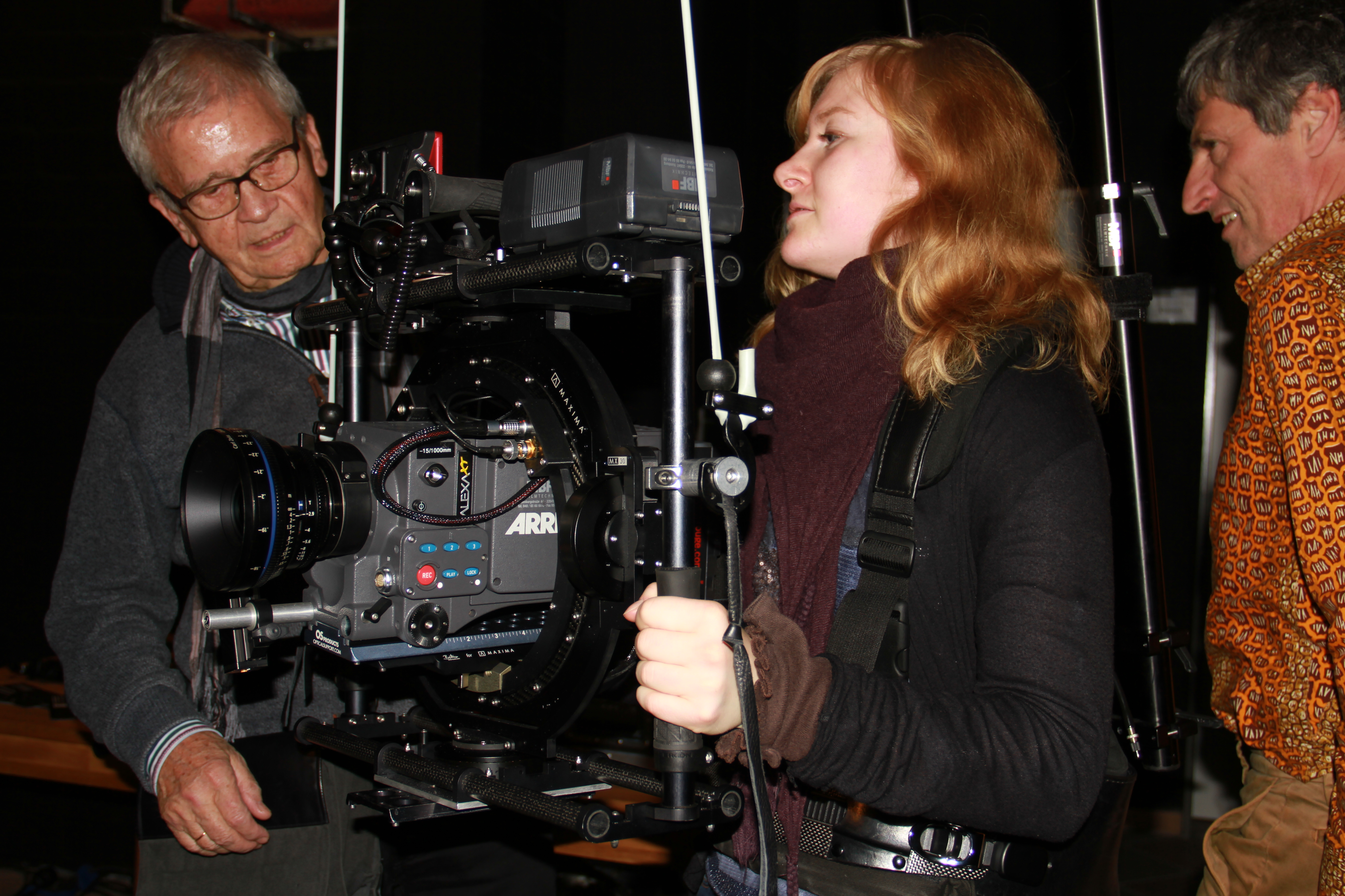 Steadicam-Vorführung auf der Jahreshauptversammlung des Bundesverbandes Kamera 2015 (im Hintergrund Jost Vacano)